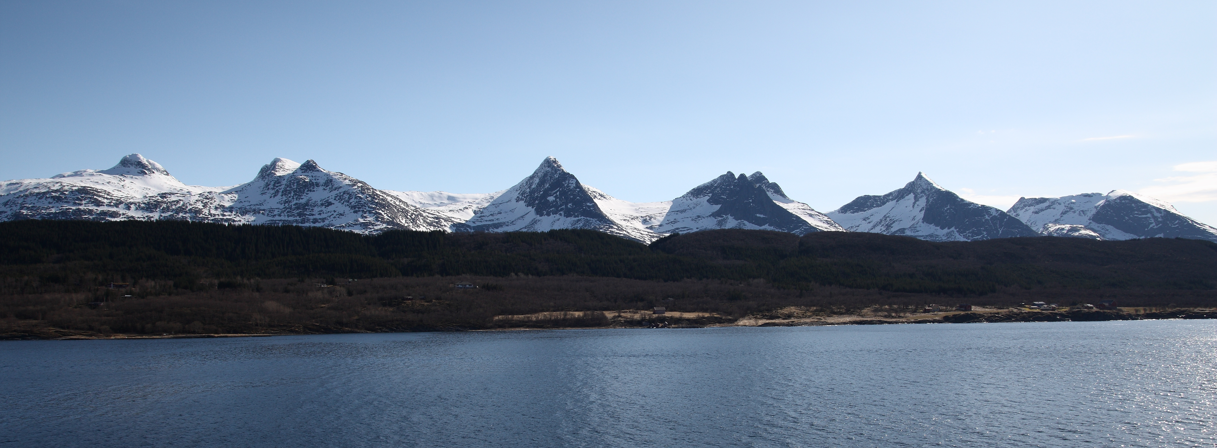 The Seven Sisters on Alstenøya, Helgeland, Nordland, Norway. From the left Botnkrona (1072), Grytfotn (1019), Skjæringen (1037), Tvillingene (The Twins 945 and 980), Kvasstinden (1010) and Breitinden (910)